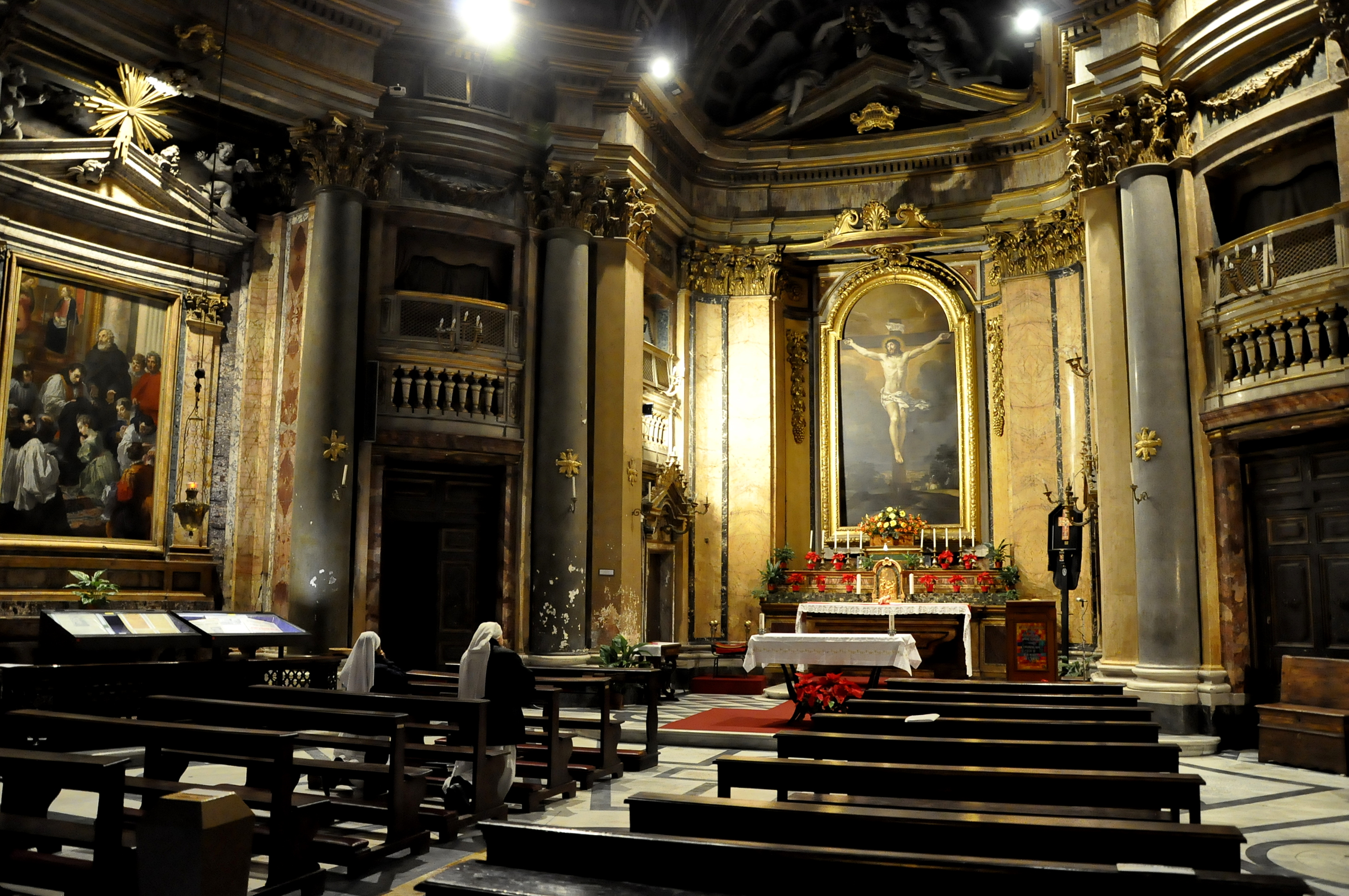 Interieur van de Santa Maria dell'Orazione e Morte te Rome